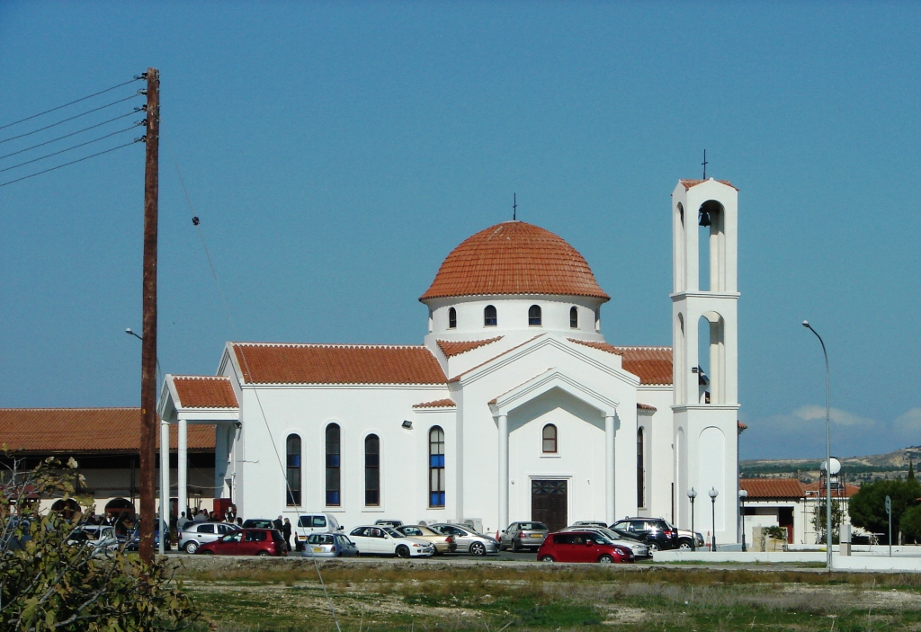 a@a Agios Savvas church Livadia Larnaca Cyprus